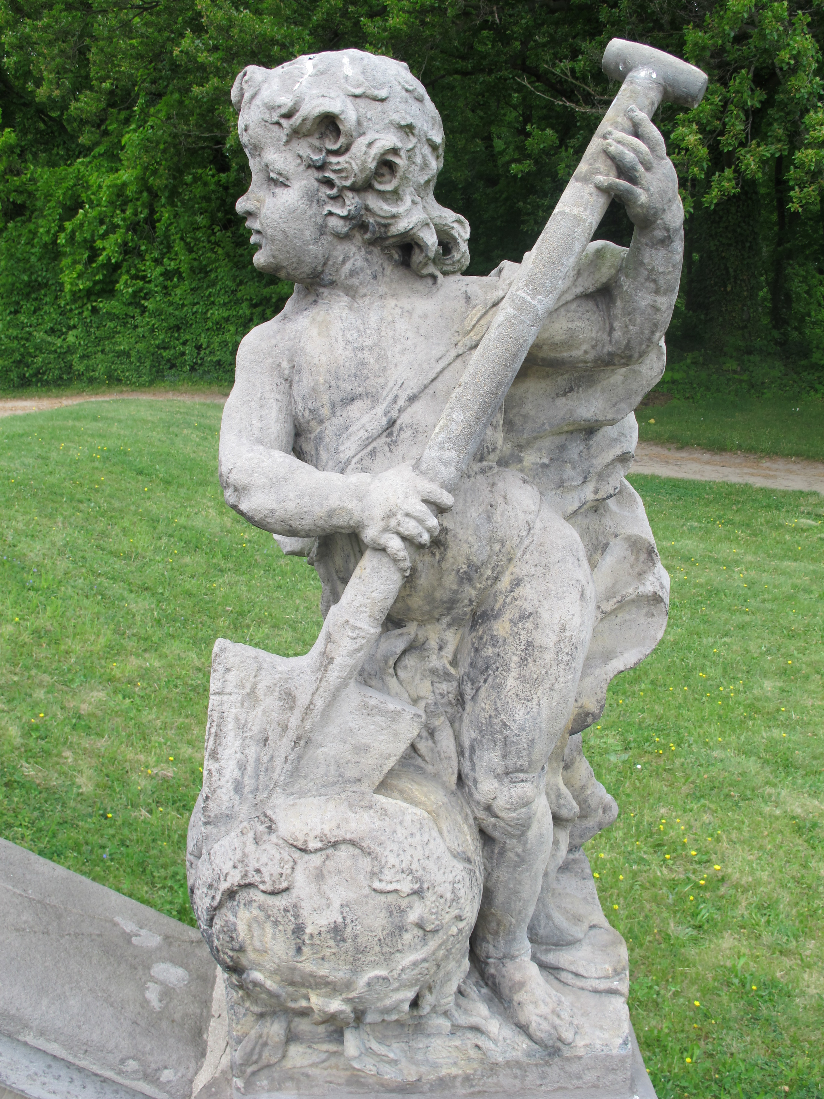 Alegorická socha Země. Zámek Lysá nad Labem, Zámecká 1/21, Lysá nad Labem